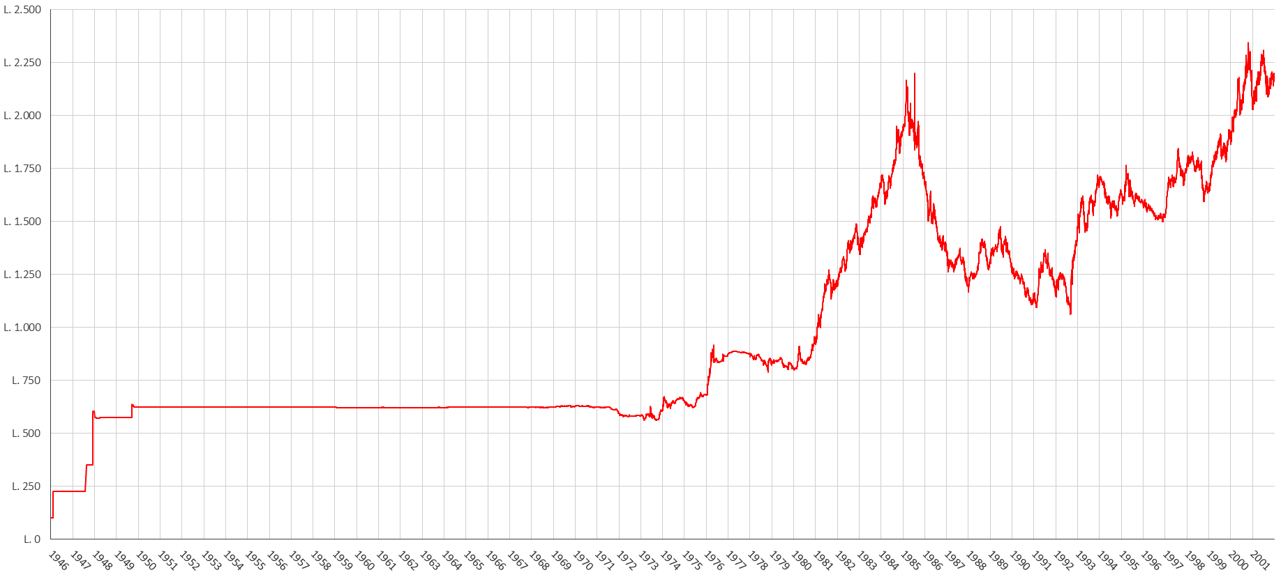 Grafico del cambio Lira/Dollaro dal 7 febbraio 1946 al 28 dicembre 2001